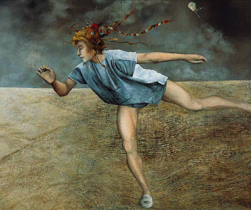 El visionario. Óleo - tabla 150 x 110 cm. Marcial Gómez 1983